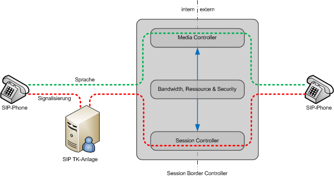 Session Border Controller Blockschaldbild